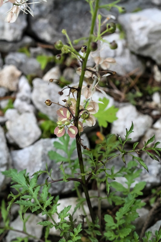 Slowenien, Julische Alpen: Botanischer Garten Alpinum Juliana in Trenta: Hoppes_Braunwurz